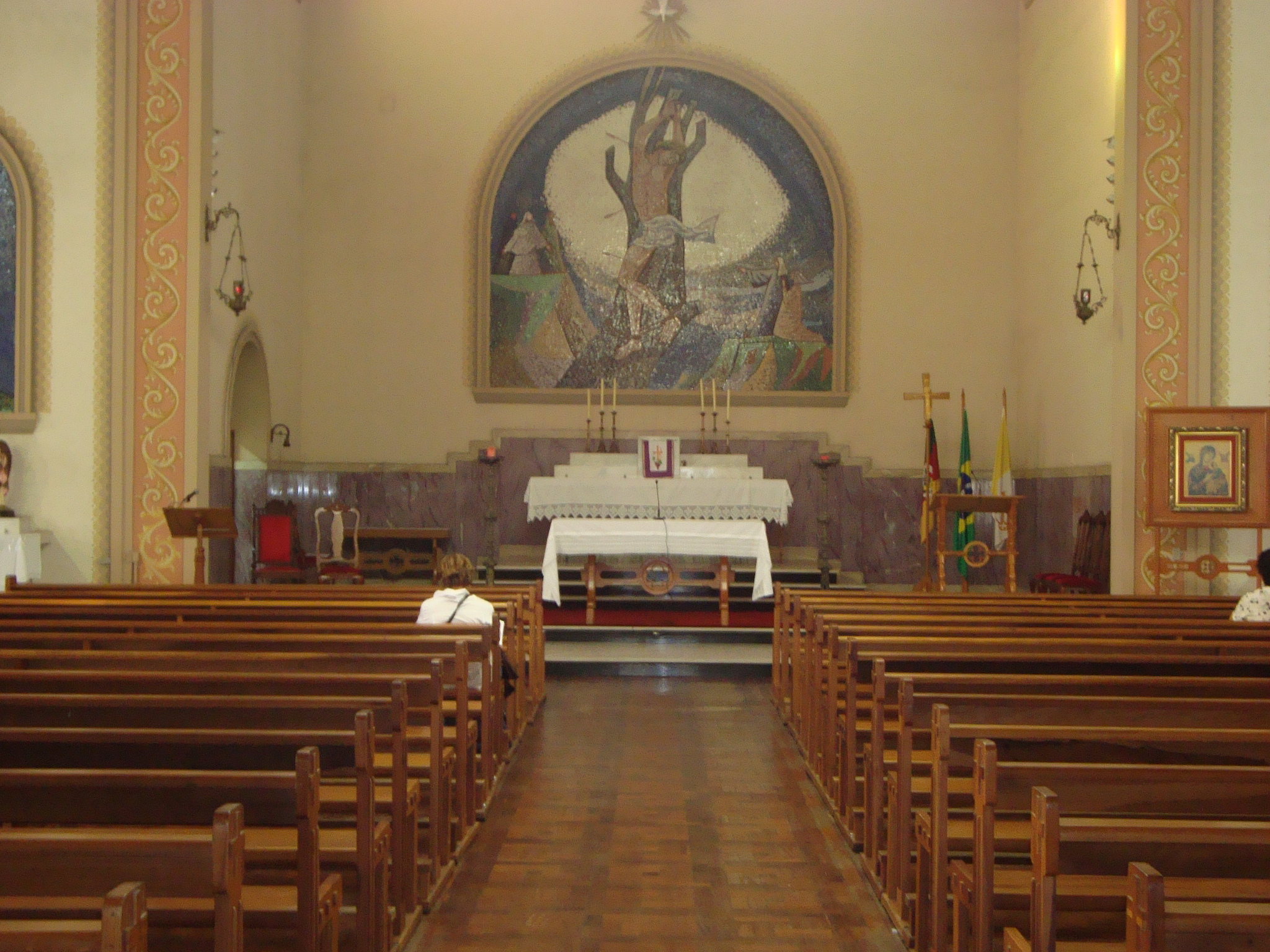 Parte Interna da Igreja São Sebastião, Porto Alegre, Rio Grande do Sil, Brasil.